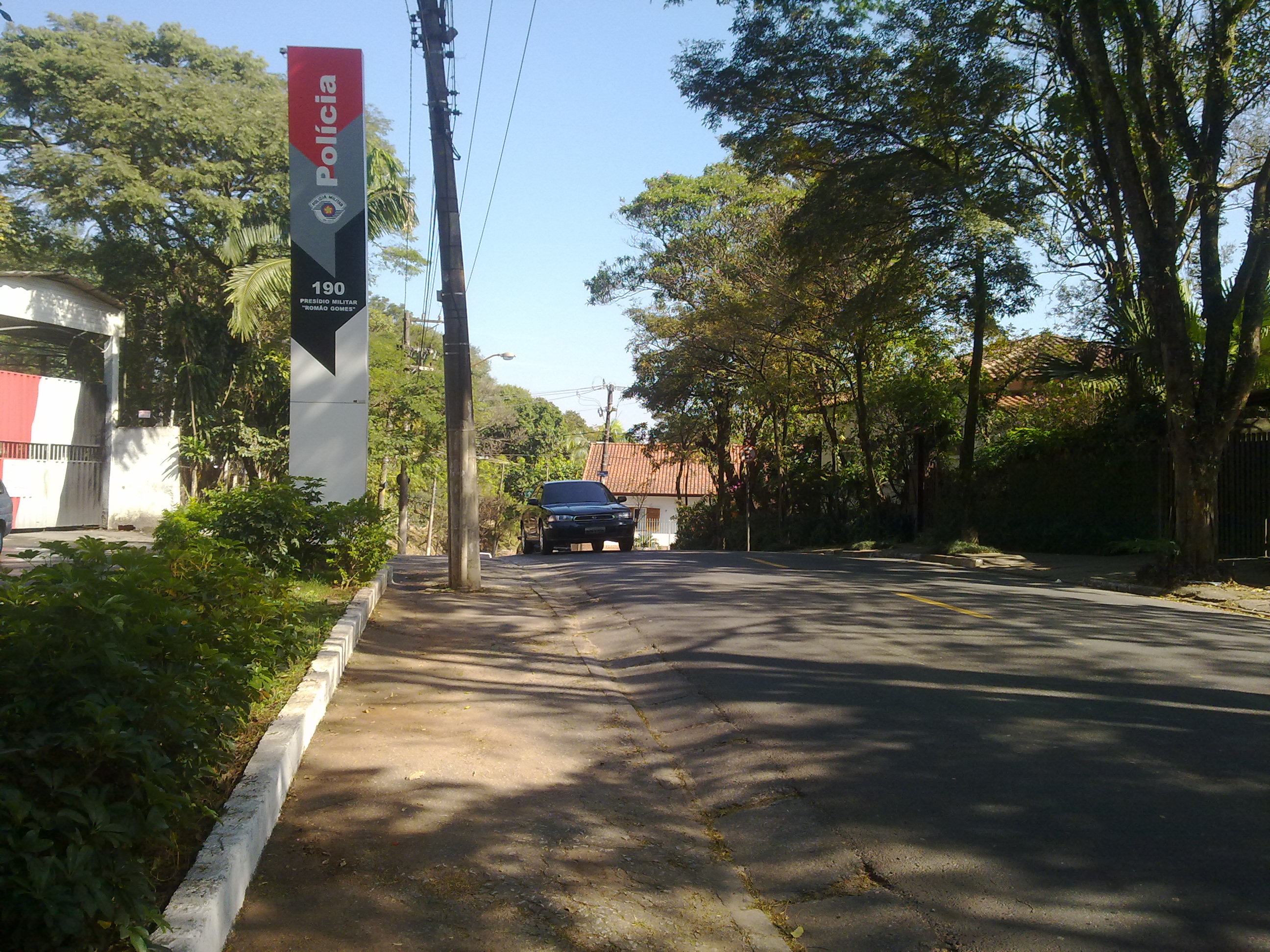 Rua arborizada do bairro de Jardim Barro Branco, localizado na Zona Norte de São paulo, Brasil.